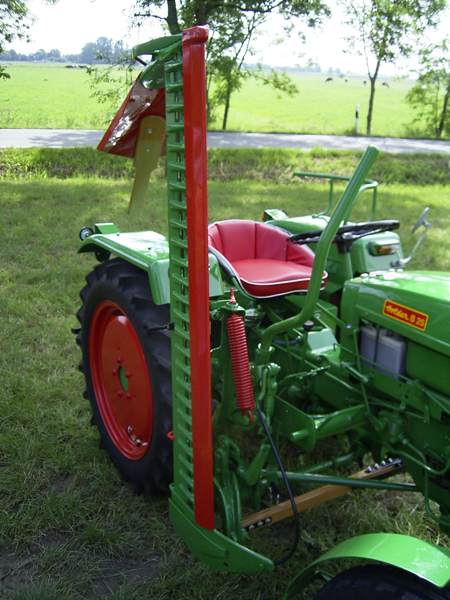 Balkenmähwerk als Anbauberät eines Traktors (Holder B 25). Das Balkenmähwerk mit einer Messerreihe wird zum Einsatz seitlich heruntergeklappt, Klingen werden vom Nebenantrieb des Traktors über eine Eschenholzstange angetrieben. Die Schneiden sind hier für den Transport durch eine rot lackierte Schutzkante abgedeckt.